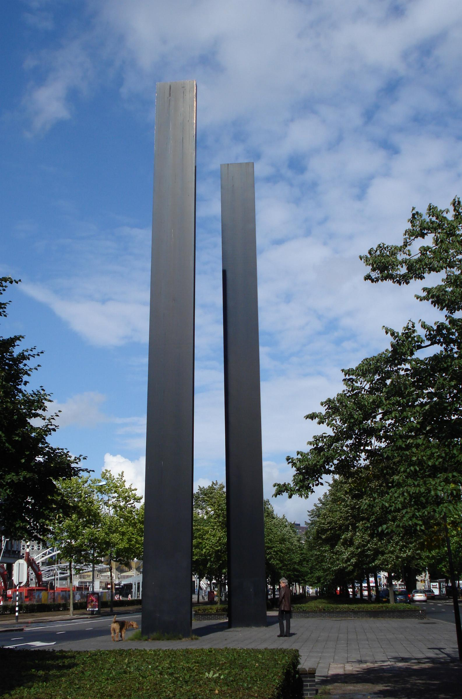 Rotterdam, Blaak. Kunstwerk zonder titel van Lon Pennock. Rotterdam/The Netherlands.